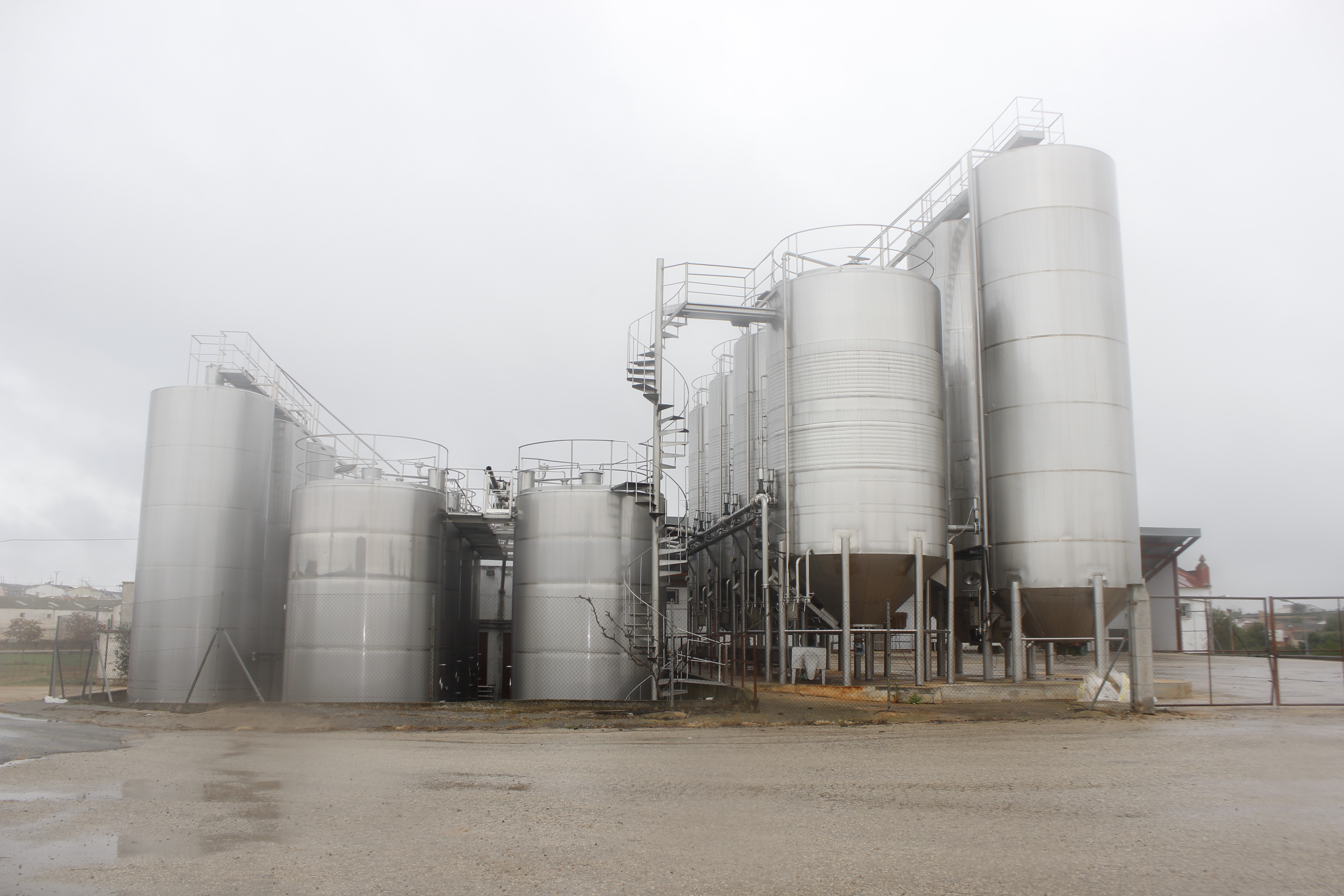 Pendiente